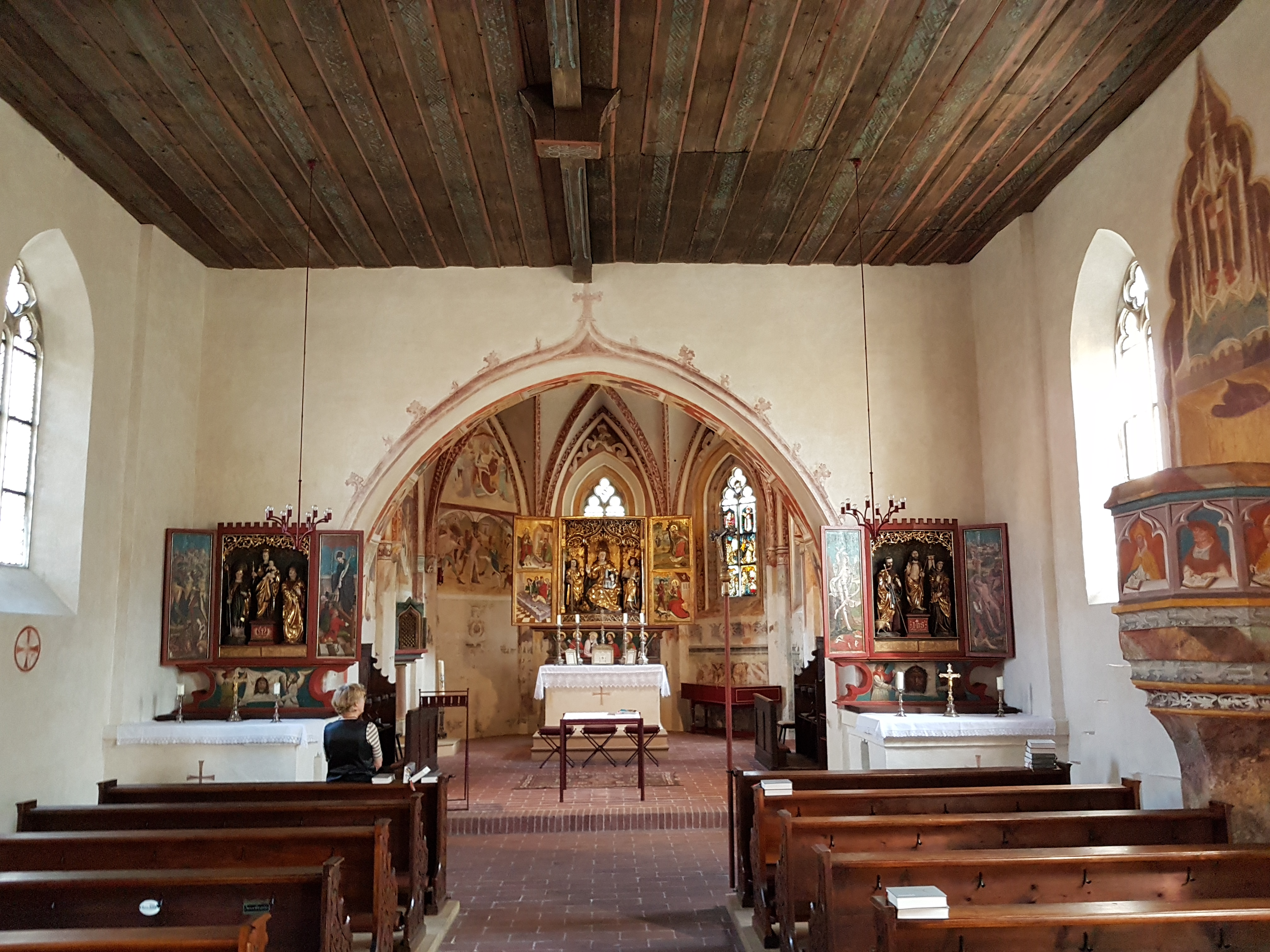 München-Pipping, St. Wolfgang, Innenraum mit Blick zum Chor.